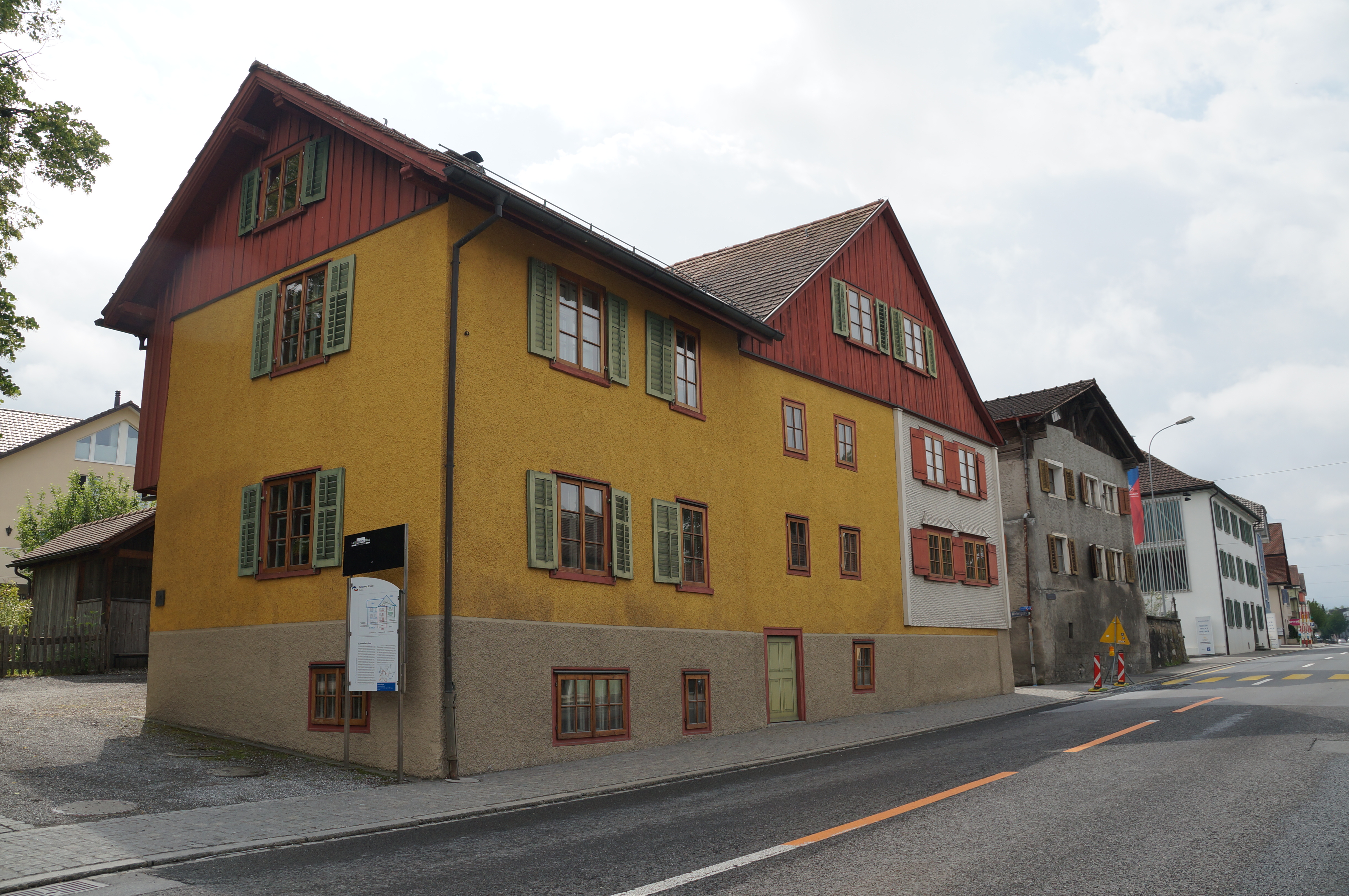 Landweilbels-Huus Schaan, Ansicht von der Hauptstrasse